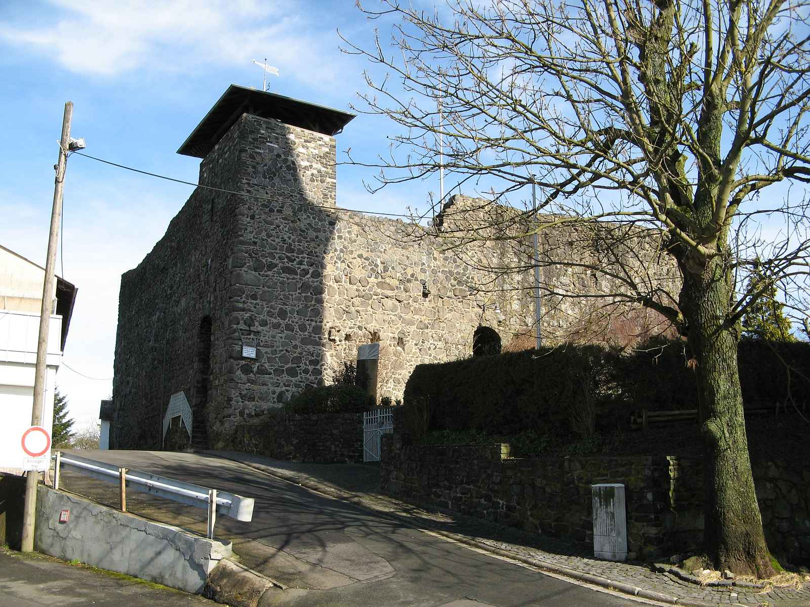 Burg in Ellar, Hessen, Deutschland